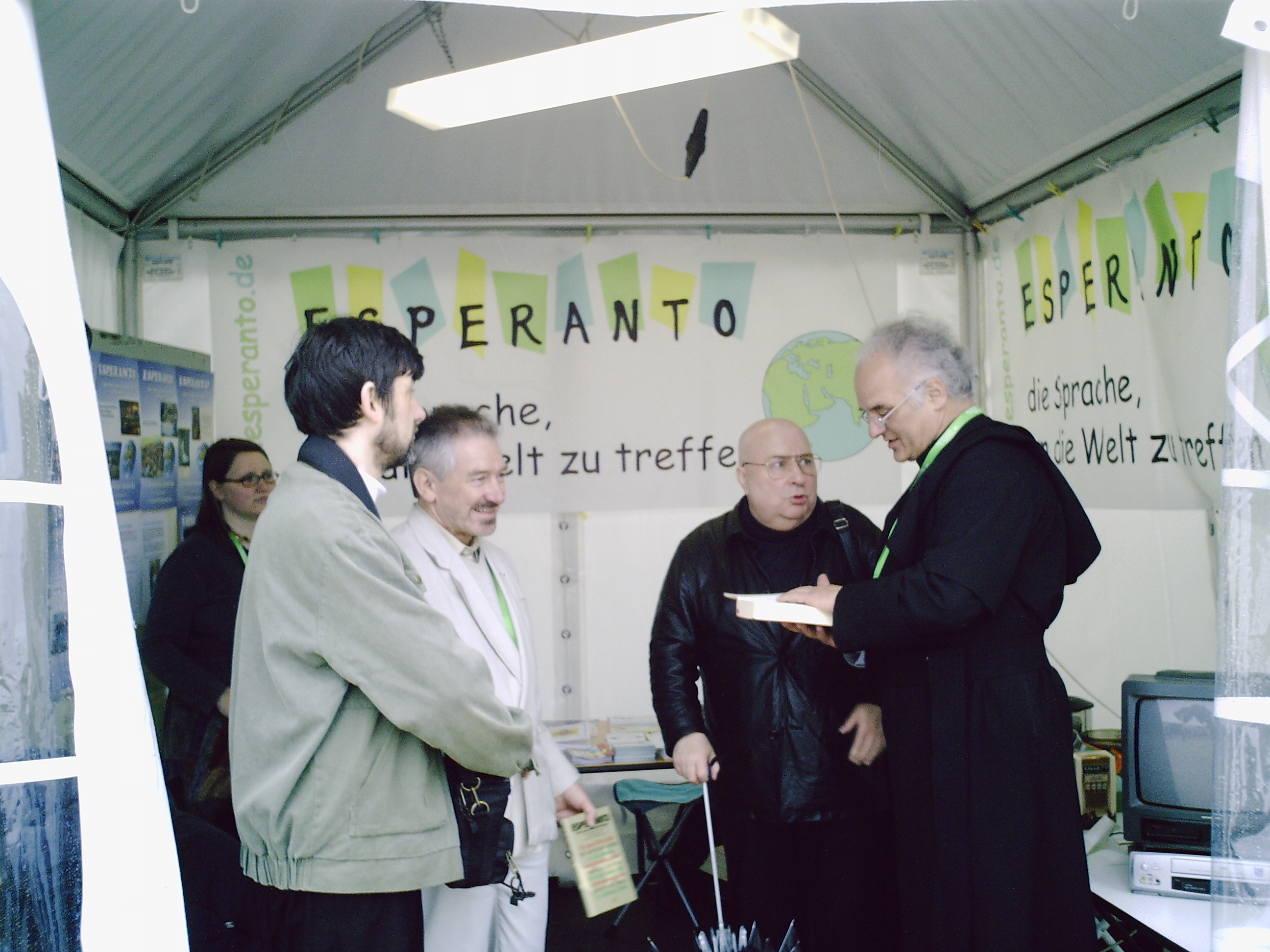 Informstando de IKUE en la Germana Katolika Foiro 2006 en Saarbrücken (Foto de Ulrich Matthias)